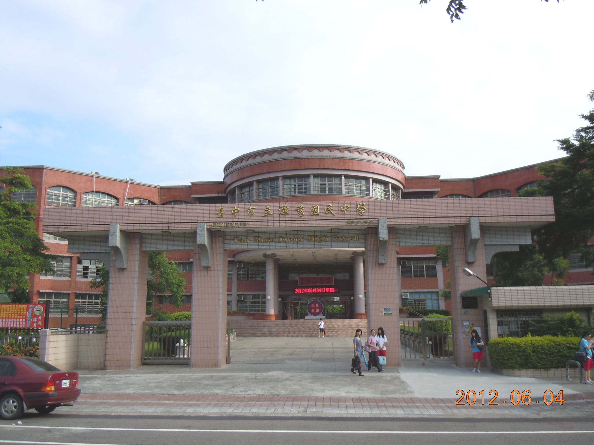 中文（台灣）: 位在臺中市潭子區雅潭路的潭秀國民中學。